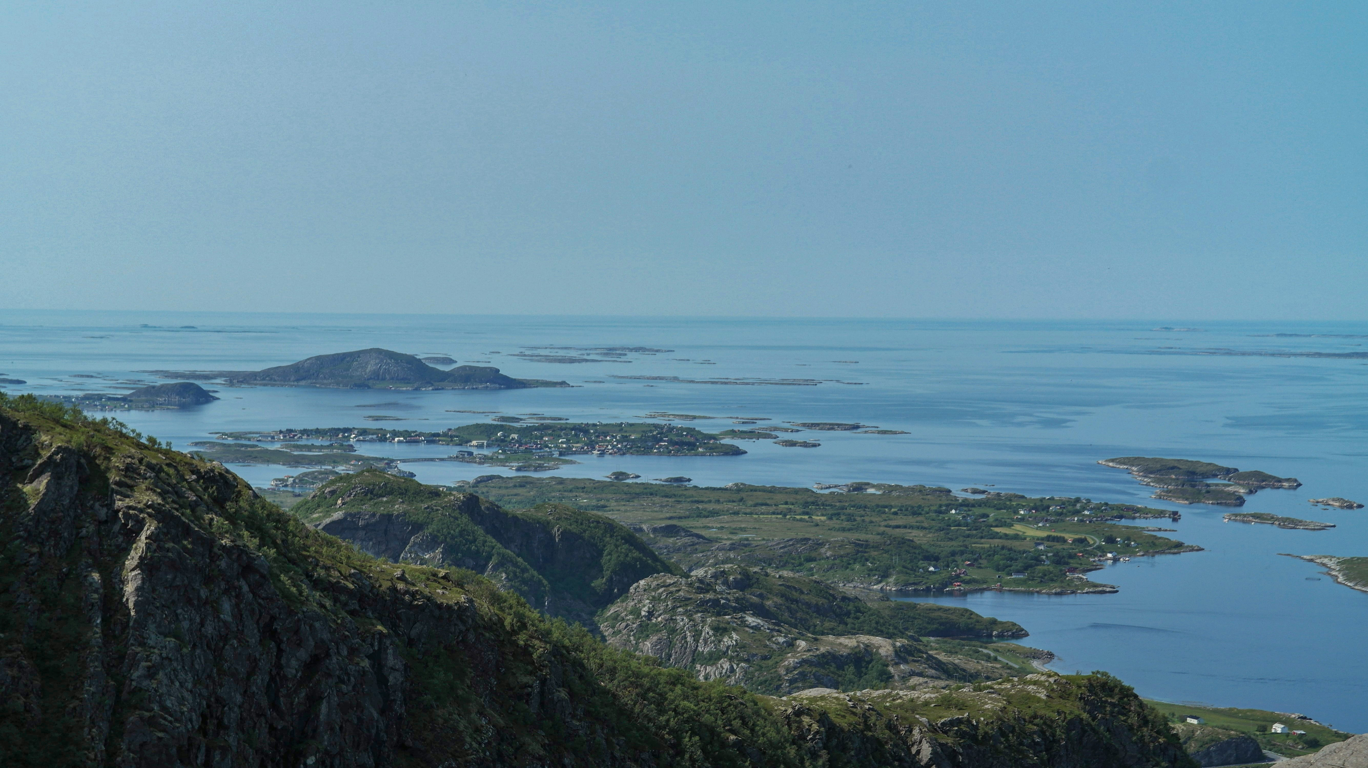 Herøy, Helgeland, Nordland, Norway